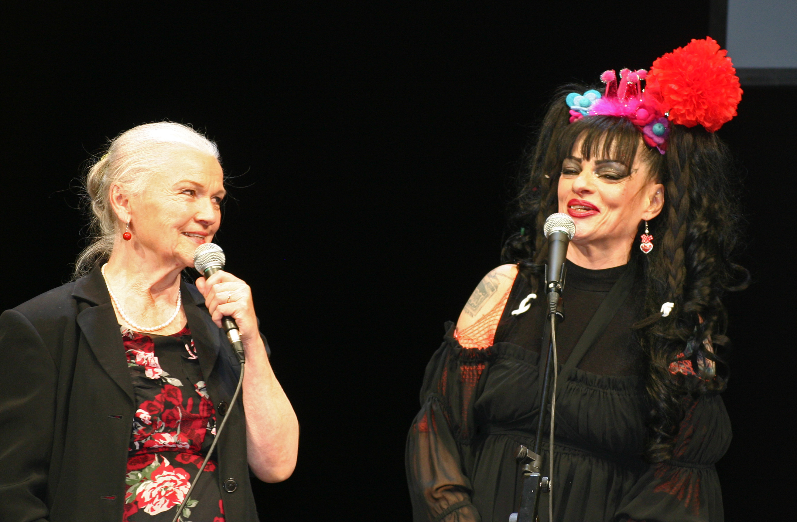 Eva-Maria und Nina Hagen während eines Auftritts im Berliner Ensemble.